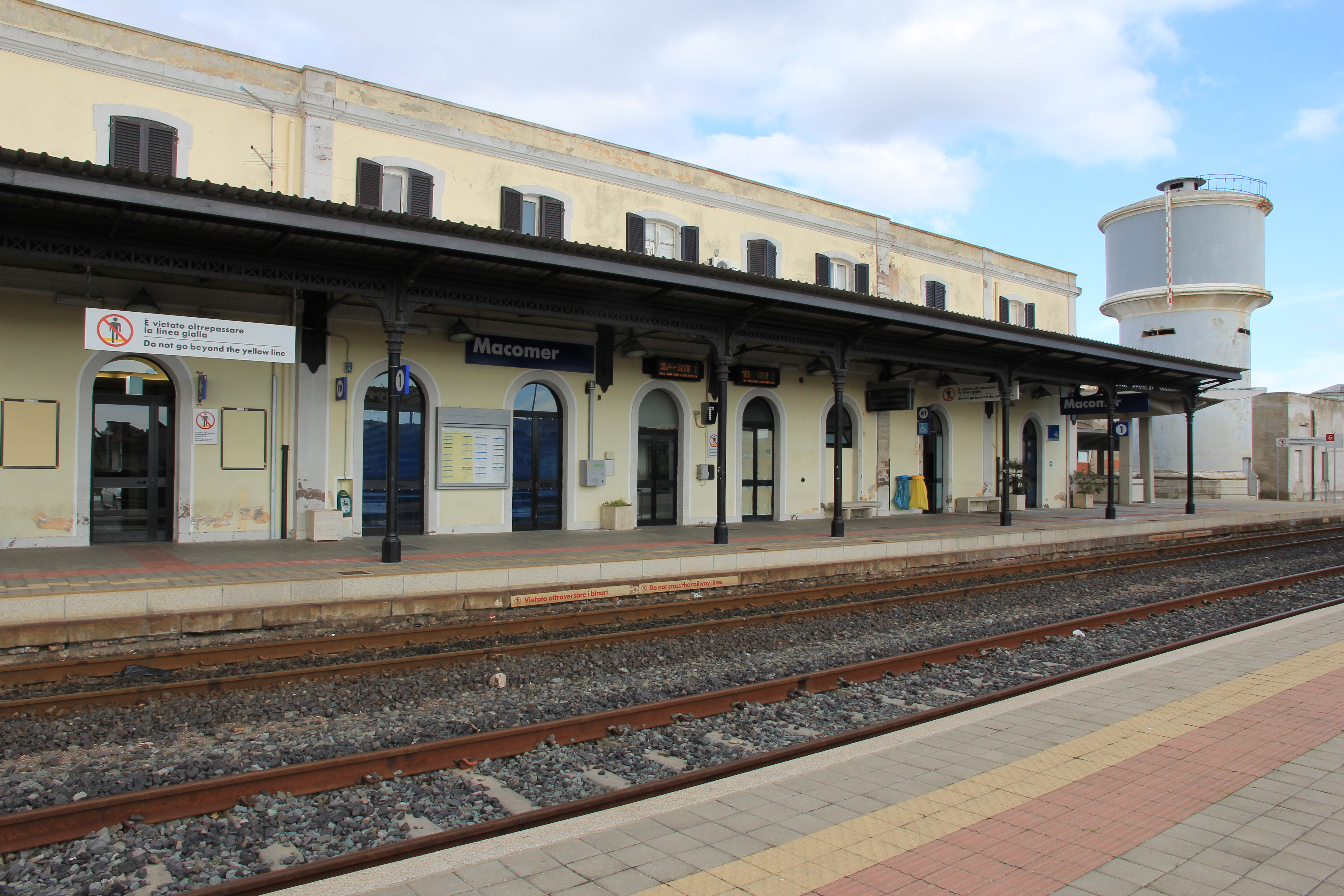 Stazione ferroviaria FS di Macomer